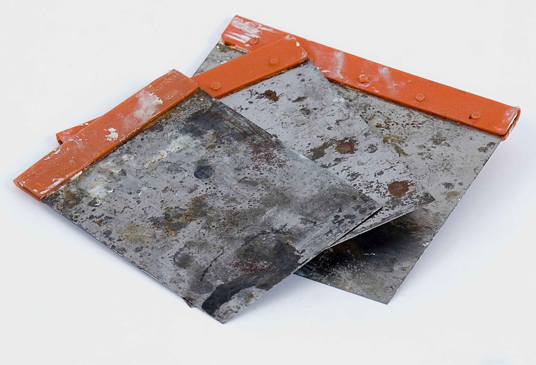 Japanspachteln